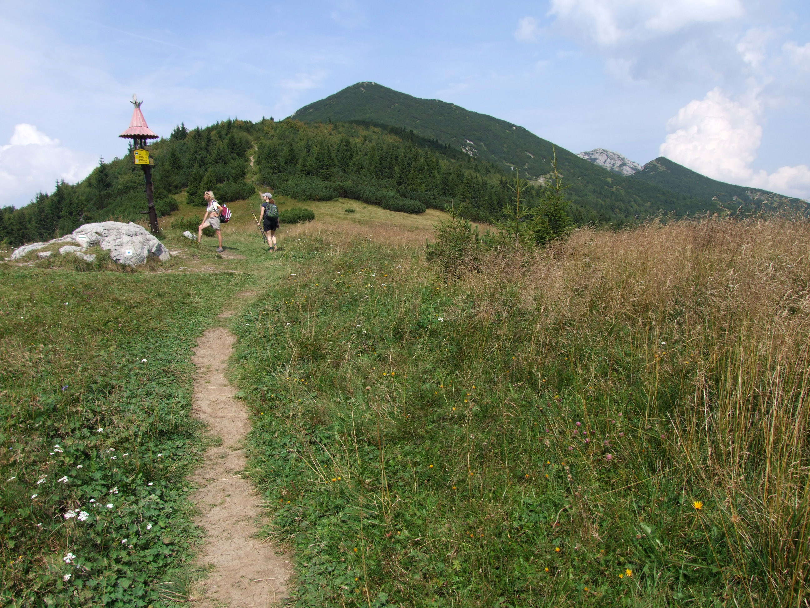 Przełęcz Przedwrocie (Pred Úvrate). W głębi widoczne kolejno: Wielka Kopa, Ostra, Sowy Wierch, Mała Ostra